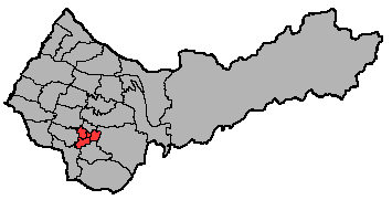 台中第六選舉區